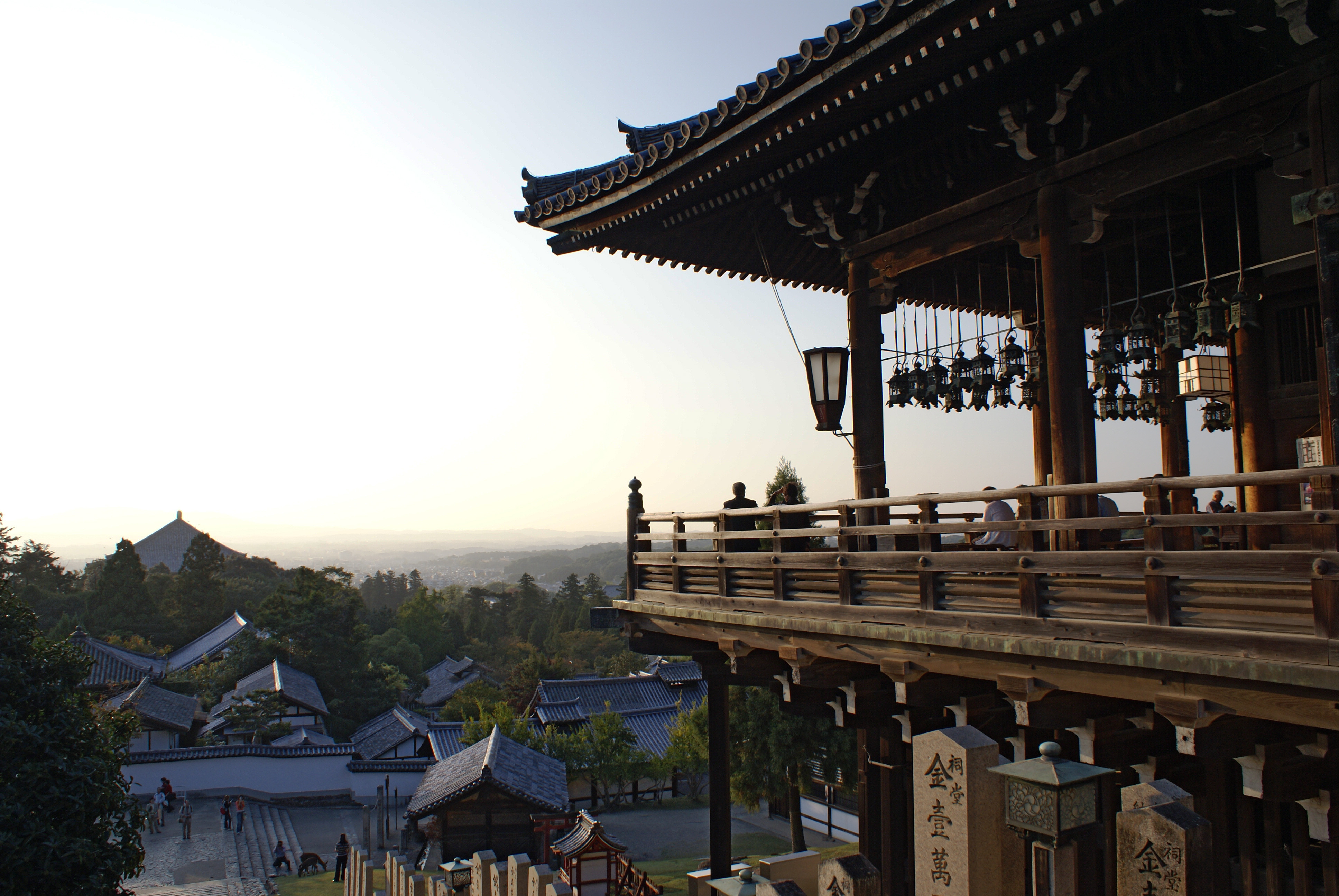 Tōdai-ji in Nara, Nara, Japan